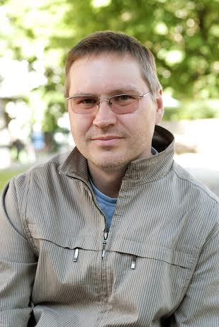 Hain Hõlpus Otsa kooli hoovis